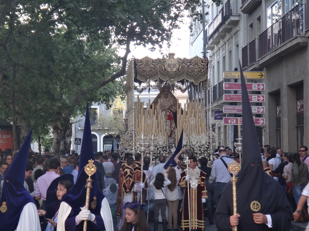 Semana Santa Jerez 2014 (Andalucía)